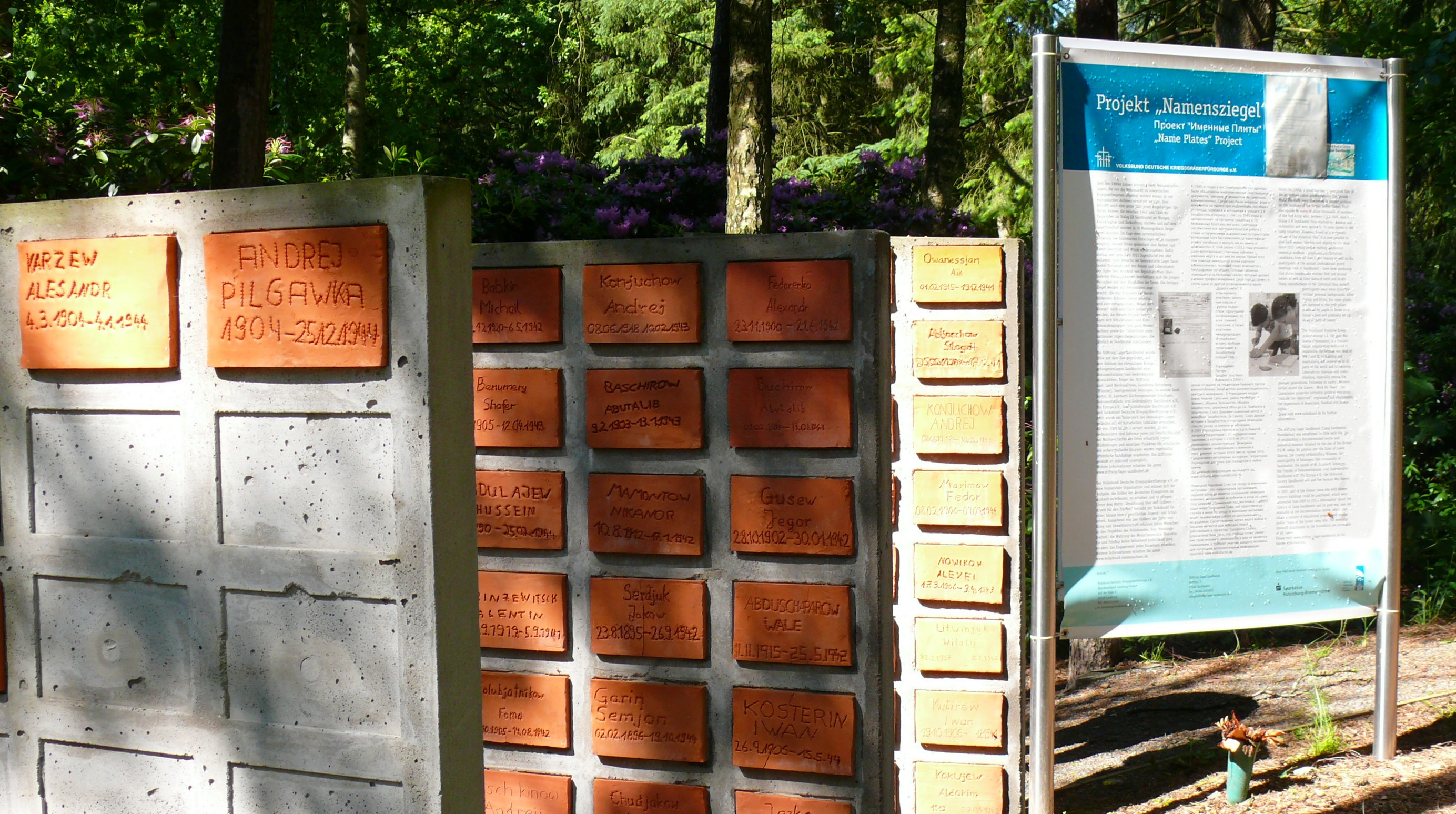 Gedenkstätte Stalag X B Sandbostel / Lagerfriedhof / Namensziegelprojekt: Von 4660 sowjetischen Geefangenen der im Lager ums Leben gekommenen Häftlingen werden an Betonstelen gebrannte Namensziegel der Namen angebracht.